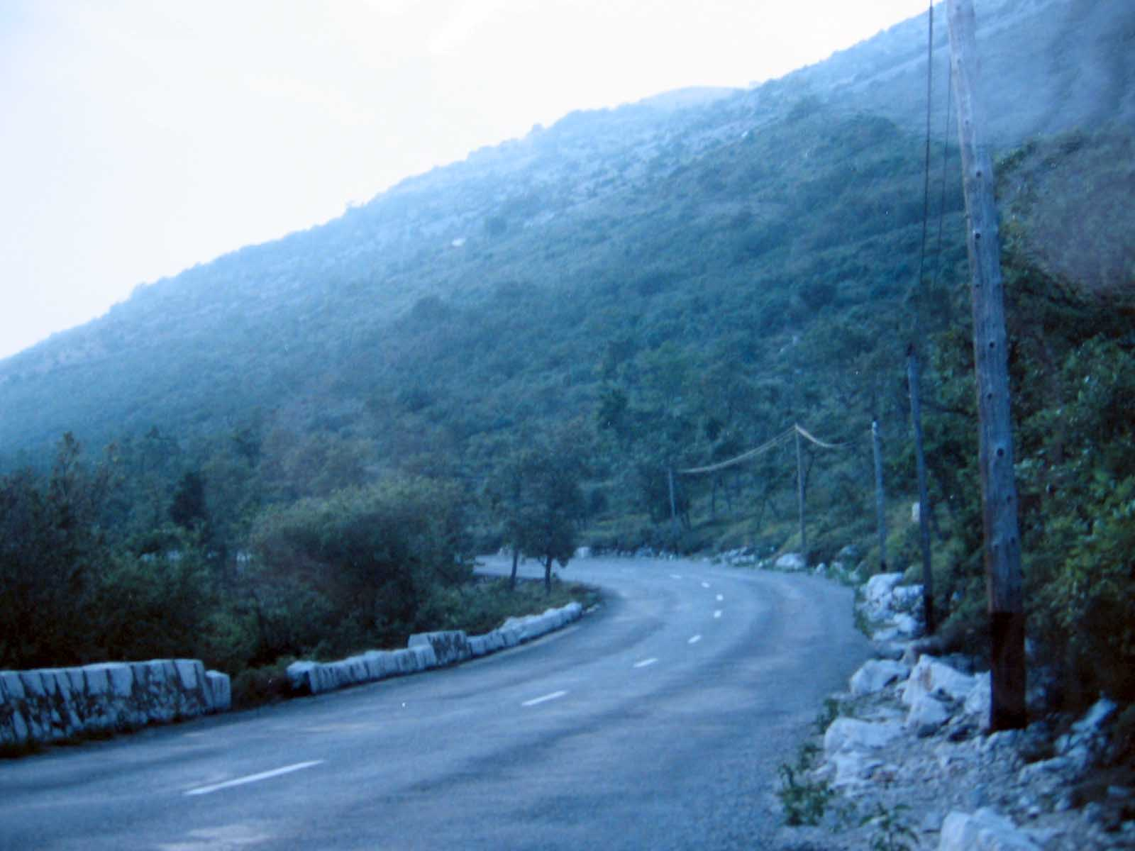 ergens nabij Gap, 1995(?)